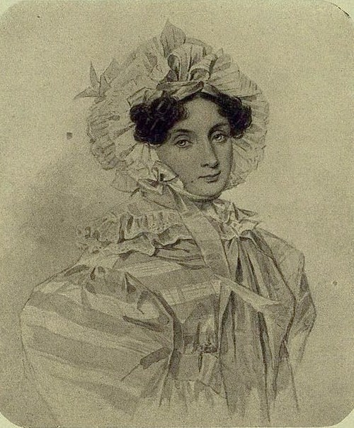 Софья Николаевна Кочубей, ур. Вяземская (1796—20 мая 1834)